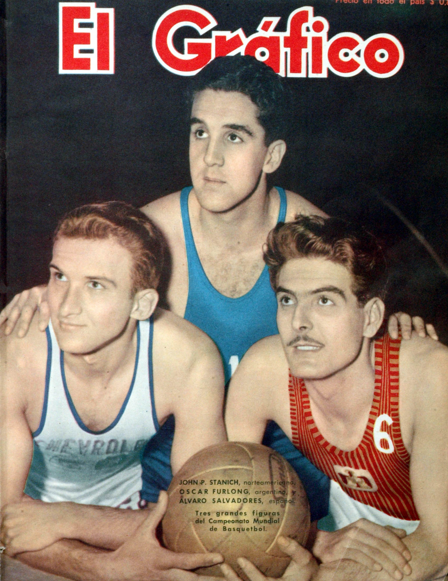 El Gráfico del 24 de Noviembre de 1950. Edicion 1633